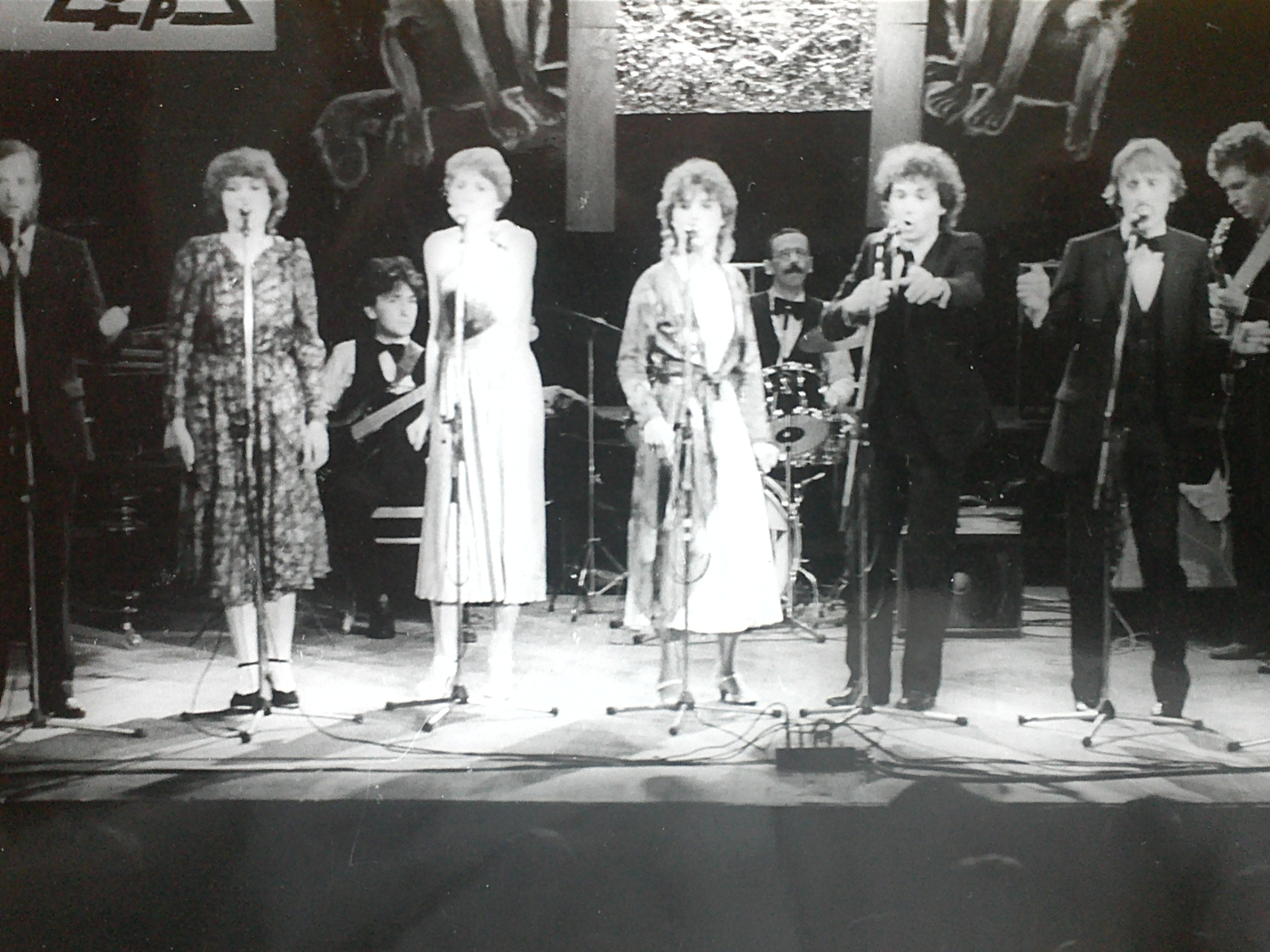 Występ zespołu Spirituals Singers Band podczas Festiwalu Jazzu Tradycyjnego „Złota Tarka" w 1982 roku (Klub Stodoła w Warszawie)